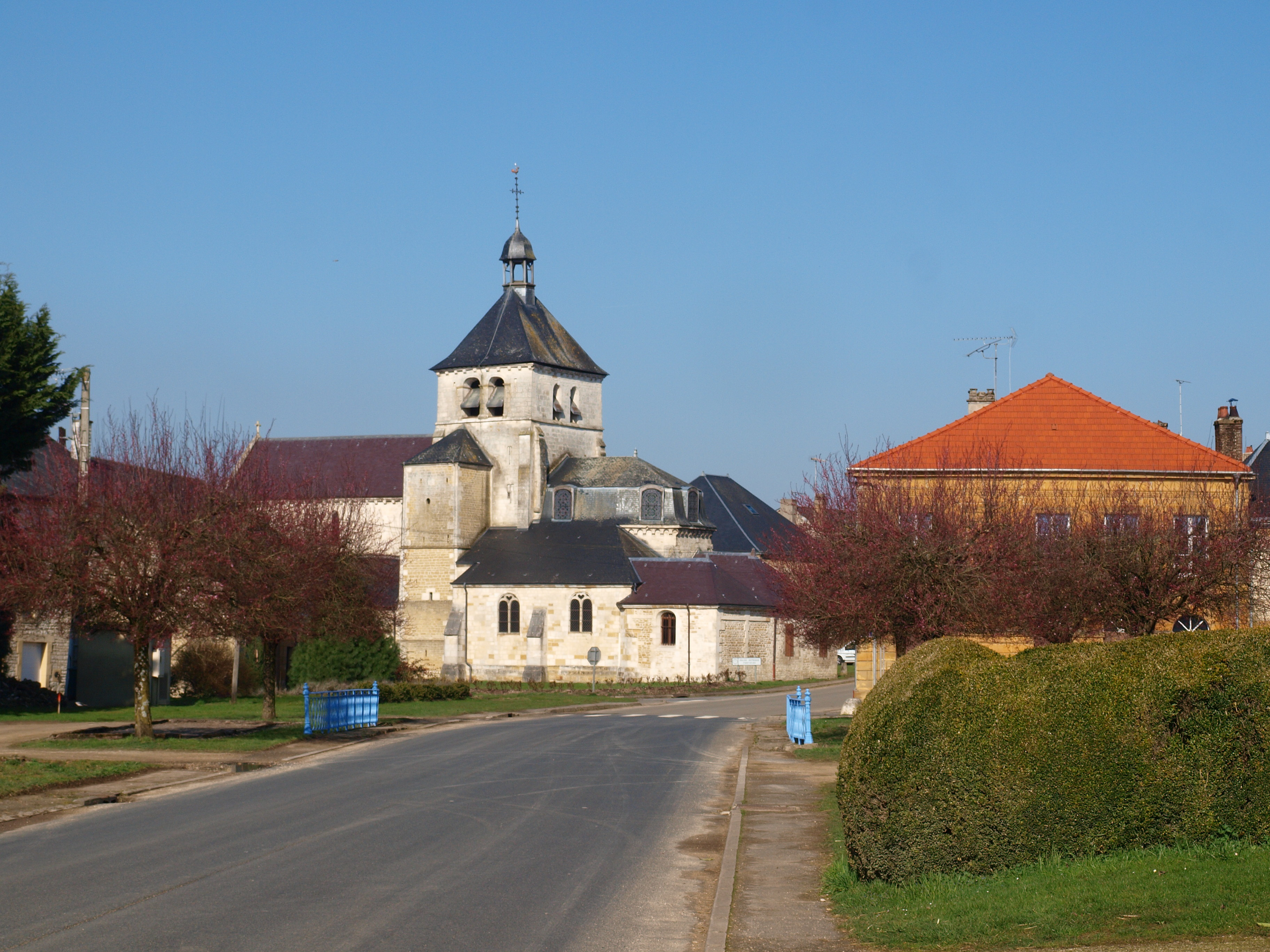 Église Saint-Martin de Vendresse (Ardennes, France)